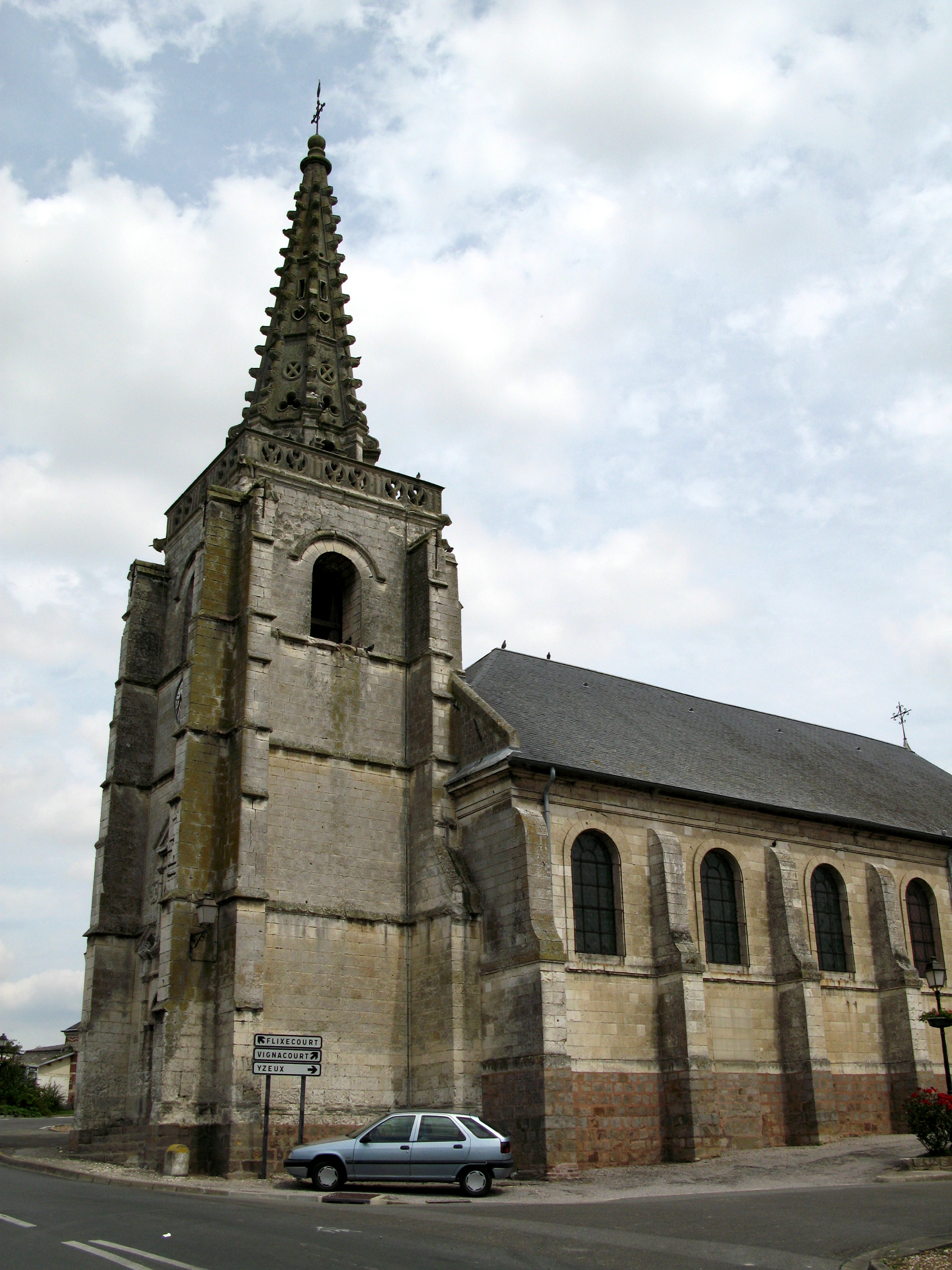 Bourdon (Somme, France) - L'église. .